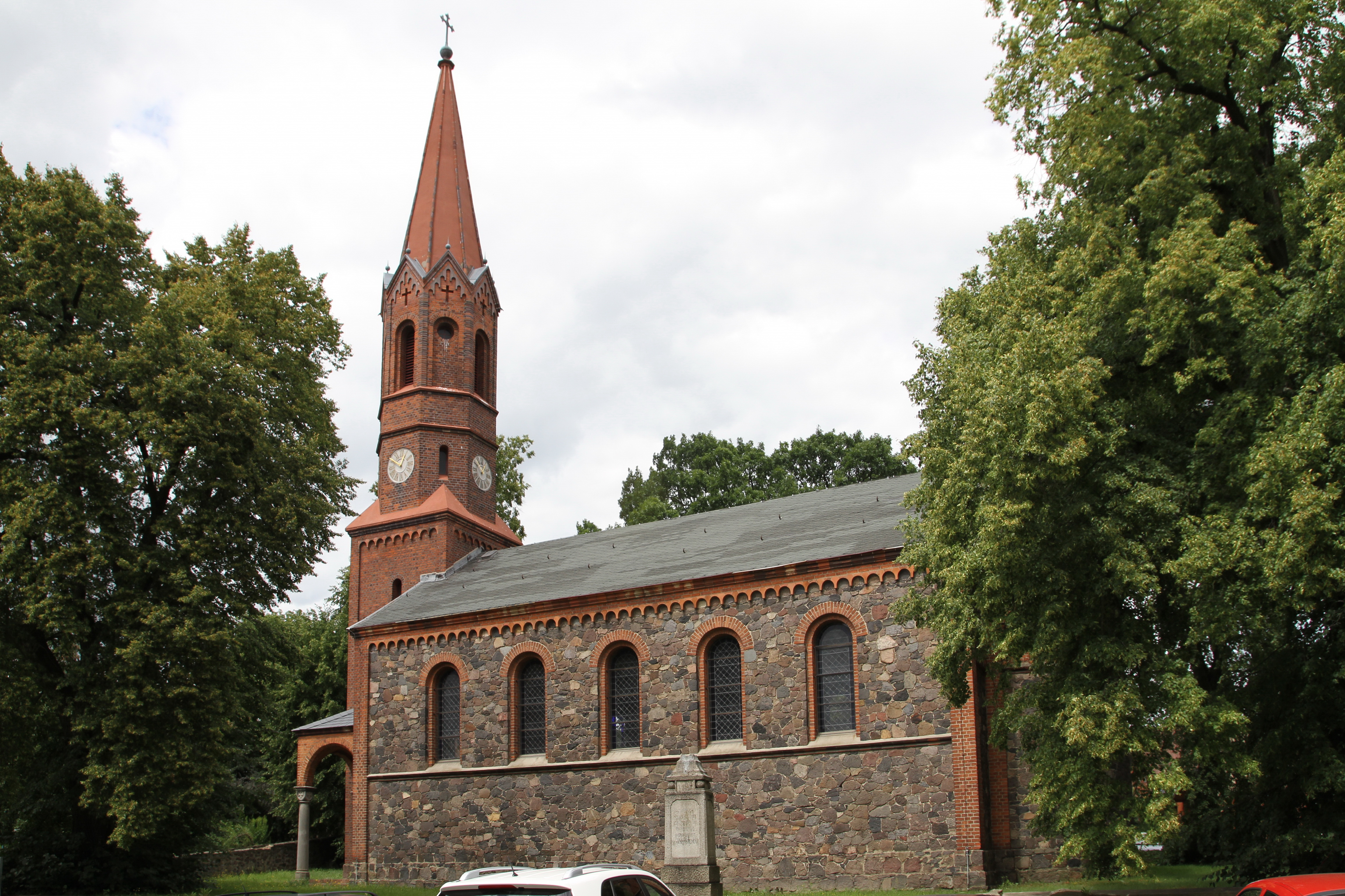 Kirsche in Bochow (Südseite)